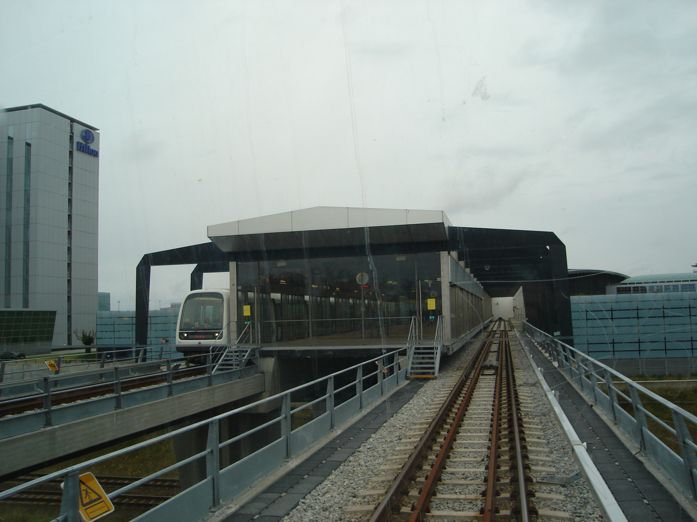 Lufthavnen Station.